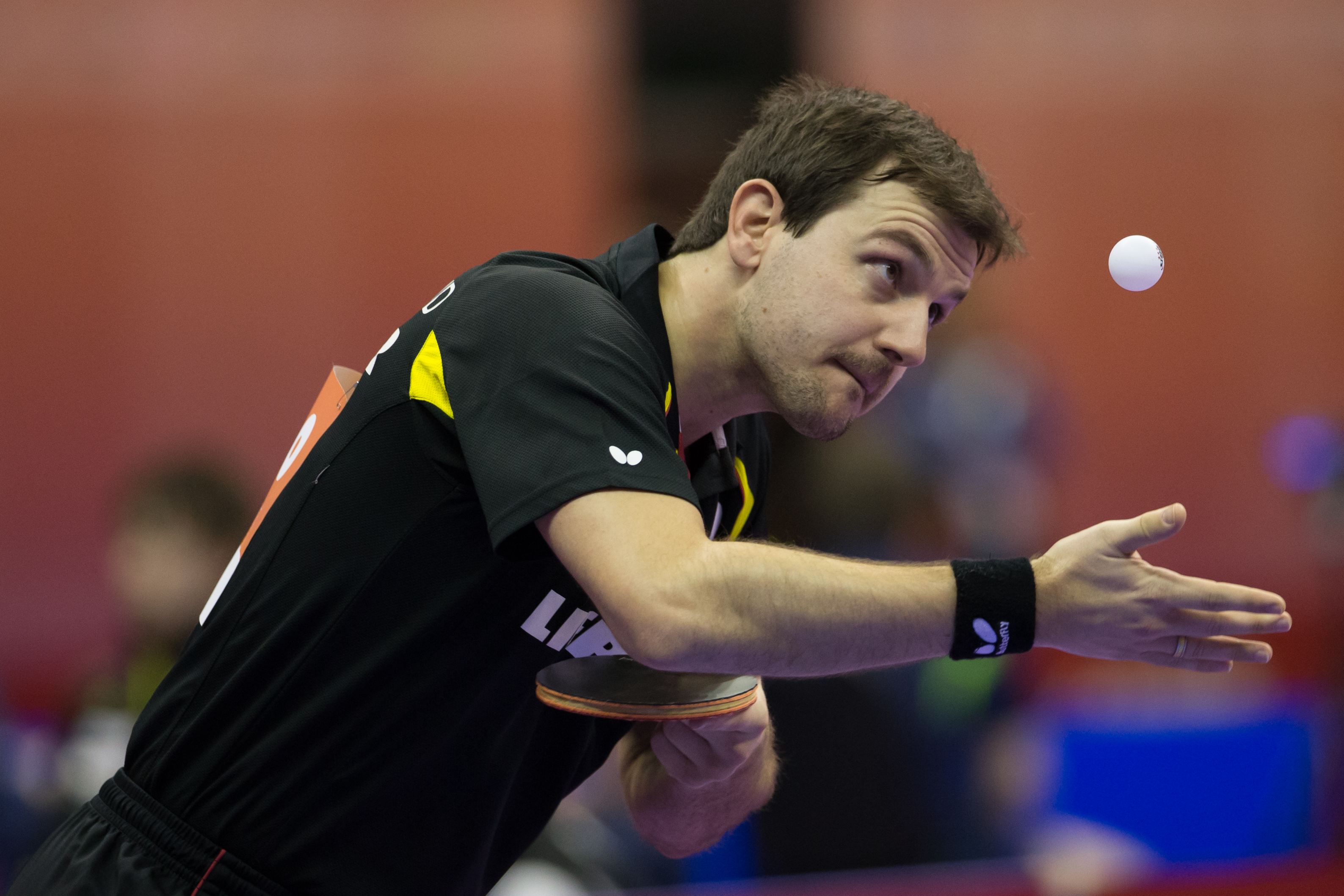 _K0K0366